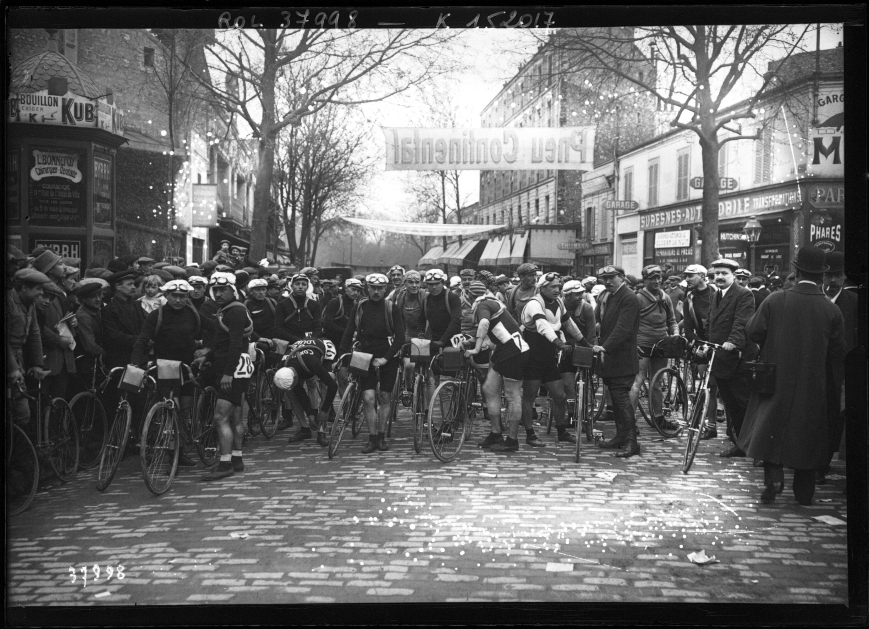 12-4-14, Paris-Roubaix [les coureurs avant le départ à Suresnes]